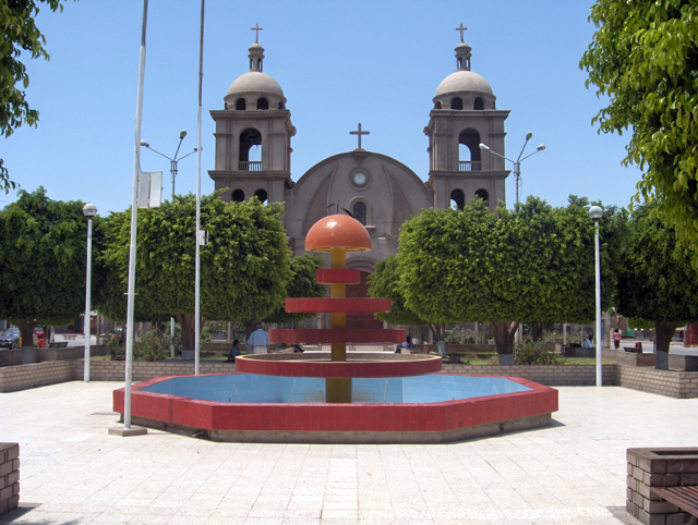 Pileta de la Plaza de Armas de la ciudad de Palpa (Ica-Perú).